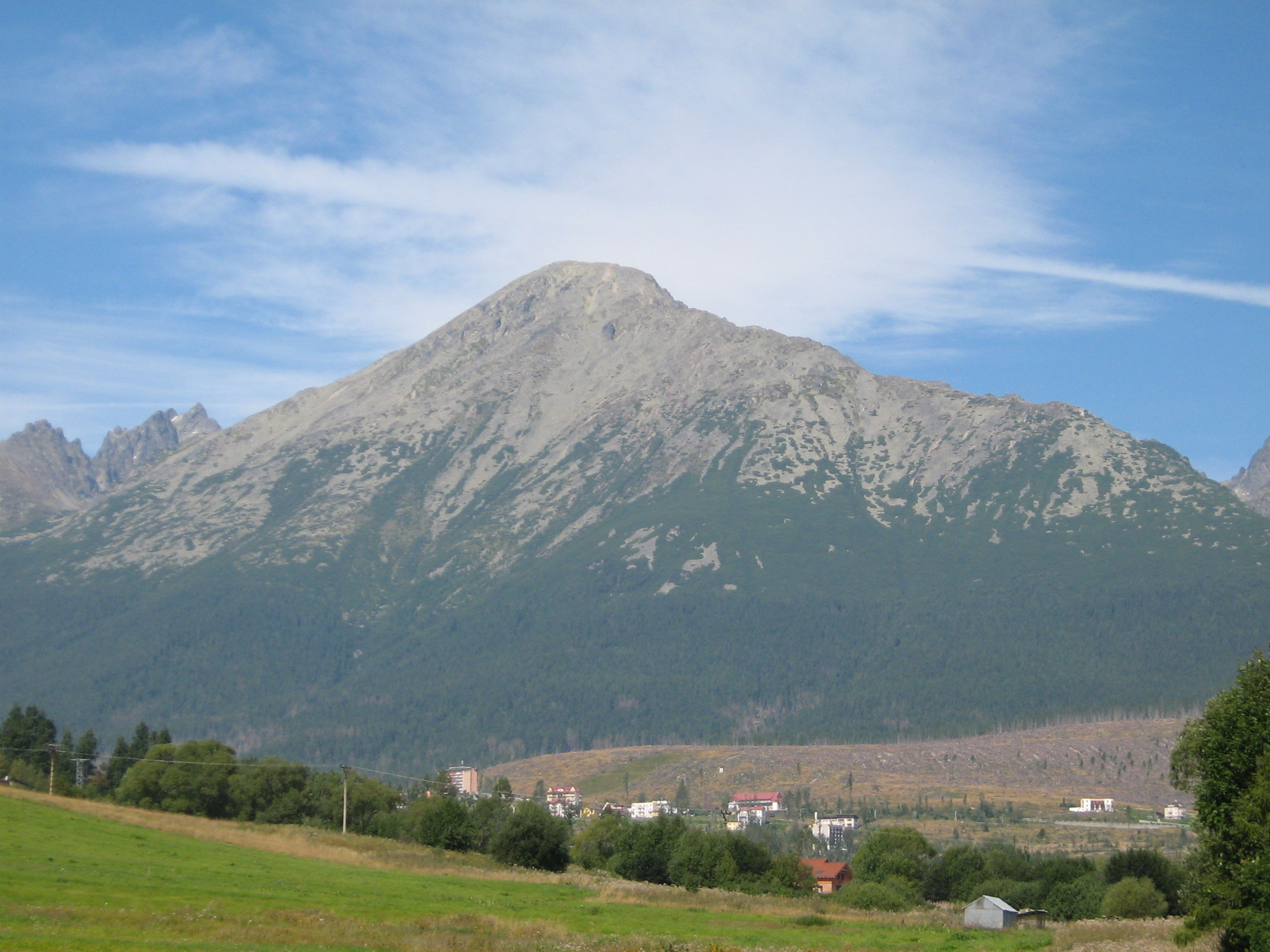 Sławkowski Szczyt,Slavkovský štít view from Nová Lesná